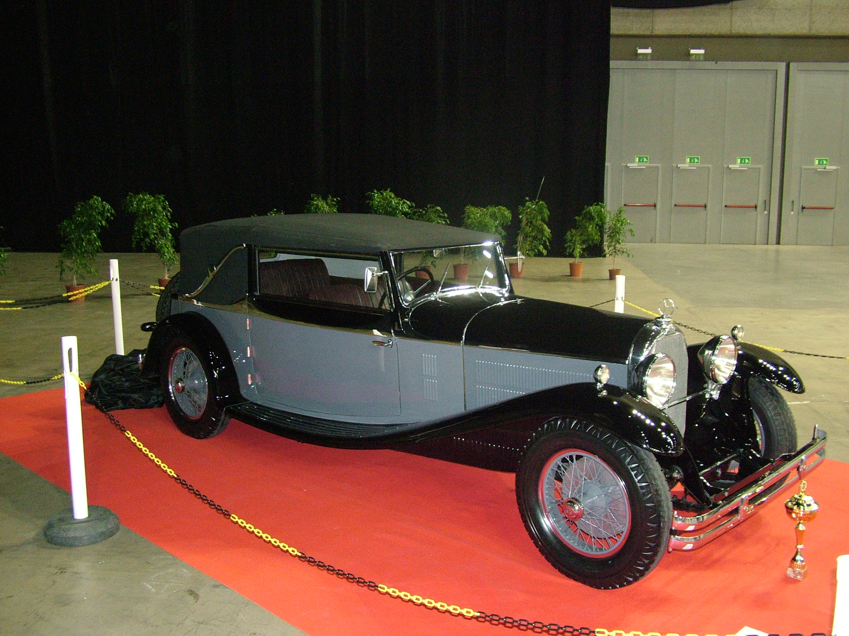 Austro-Daimler AD 12/70, 1930